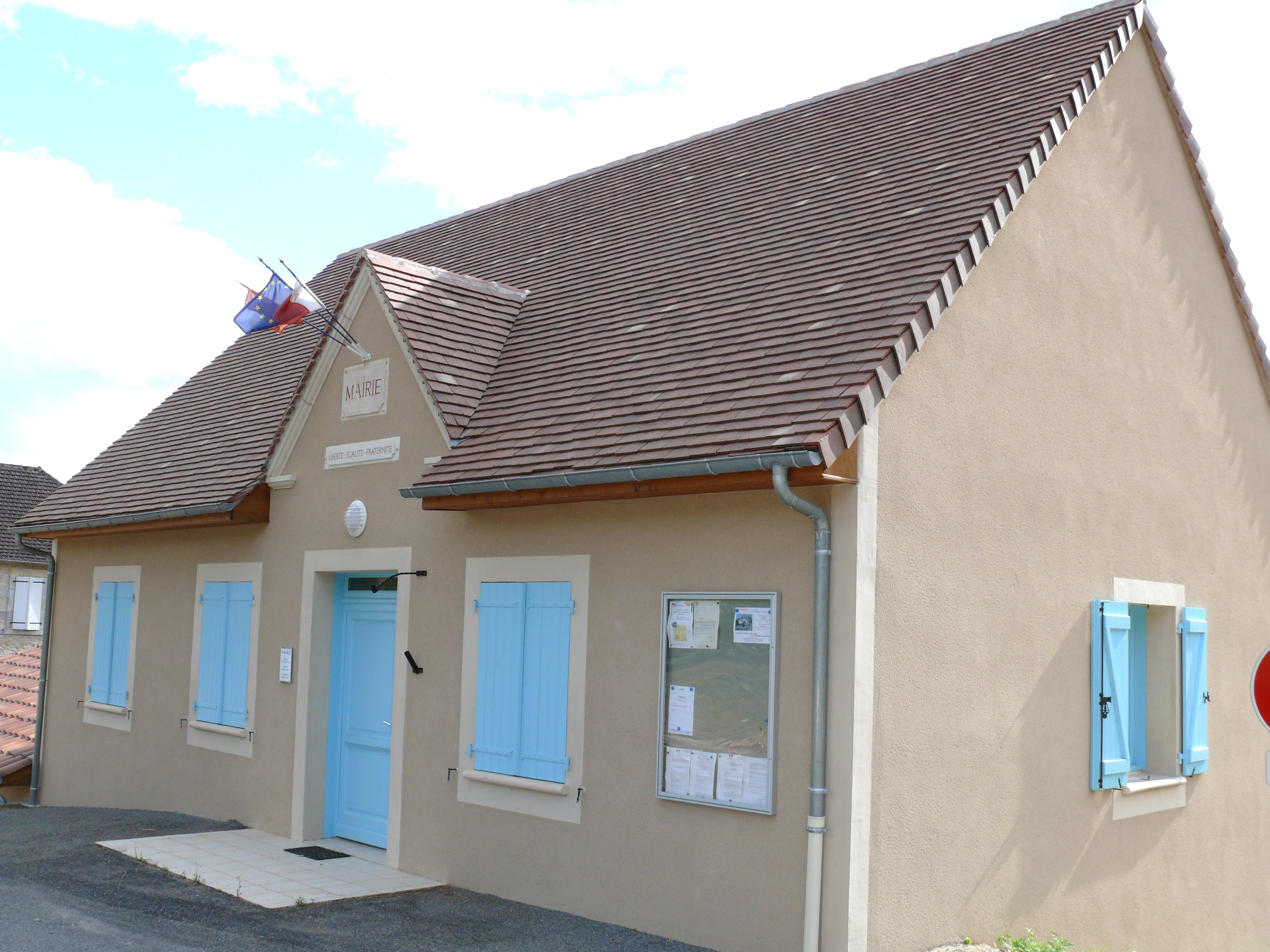 Brengues - Mairie